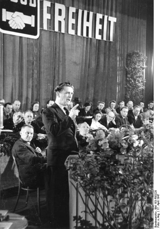 Berlin, 2. FDGB-Kongress, Hans Jendretzky ADN 2. Bundeskongress des FDGB. Der zweite Bundeskongress des Freien Deutschen Gewerkschaftsbundes in der sowjetischen Besatzungszone wurde am Donnerstag (17.4.47) in der Berliner Staatsoper durch den 1. Vorsitzenden des FDGB, Hans Jendretzky eröffnet. An der Tagung, die sich über drei Tage erstreckt, nehmen etwa 1000 Delegierte teil. Die Aufnahme zeigt Hans Jendretzky bei der Eröffnungsrede. 508-47 Abgebildete Personen: Jendretzky, Hans: Mitglied des ZK der SED, DDR